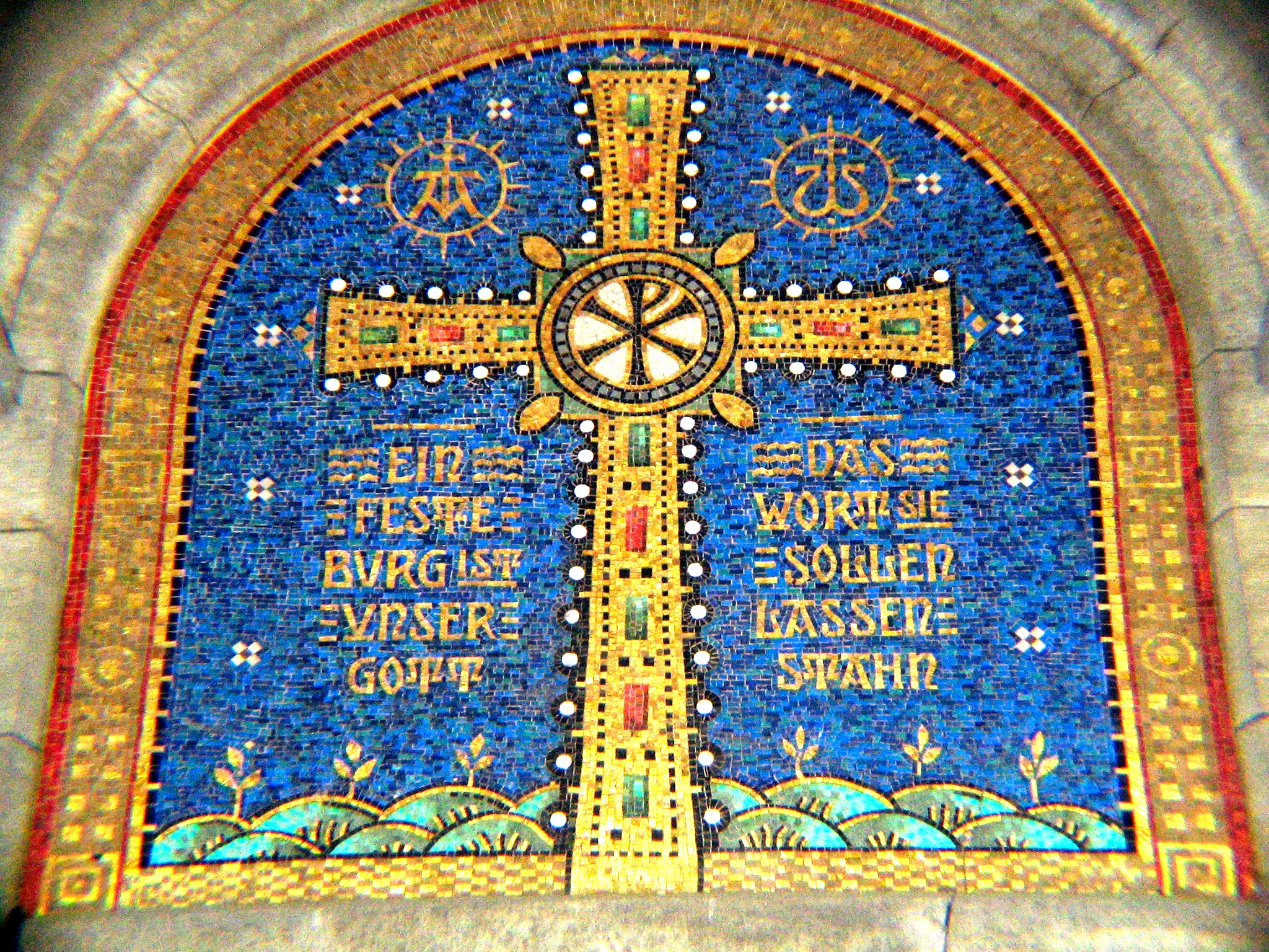 Mosaik mit Kreuz-Motiv in der Lutherkirche in Wiesbaden